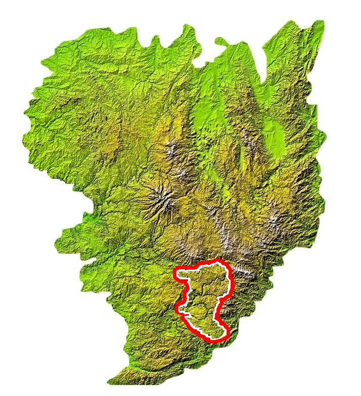 Situation des Grands Causses sur la carte du Massif central